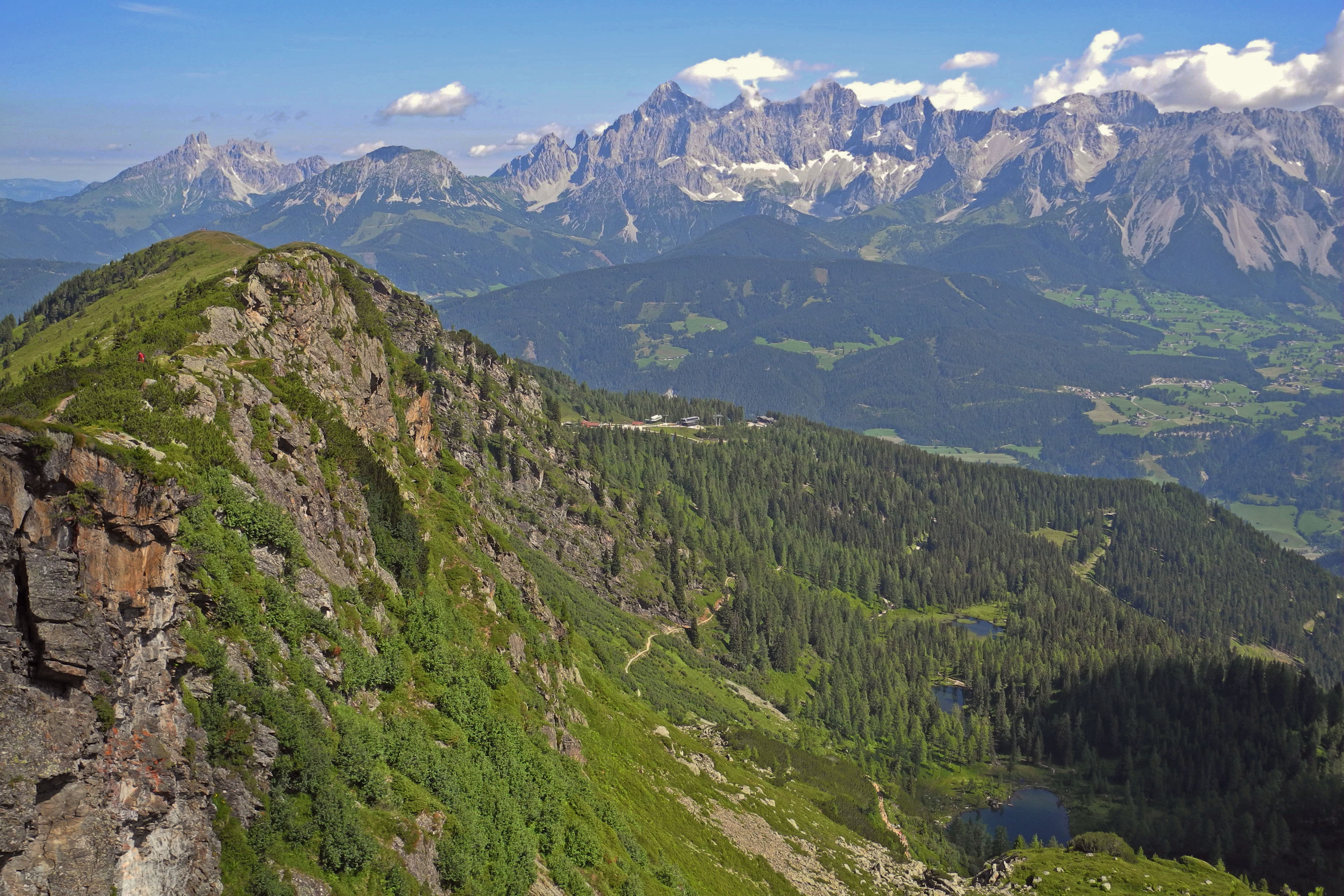 Kammweg auf der Gasselhöhe: Blick zur Bischofsmütze, zum Rötelstein und zum Dachsteinmassiv sowie die Reiteralm mit Untersee, Mittersee und Obersee